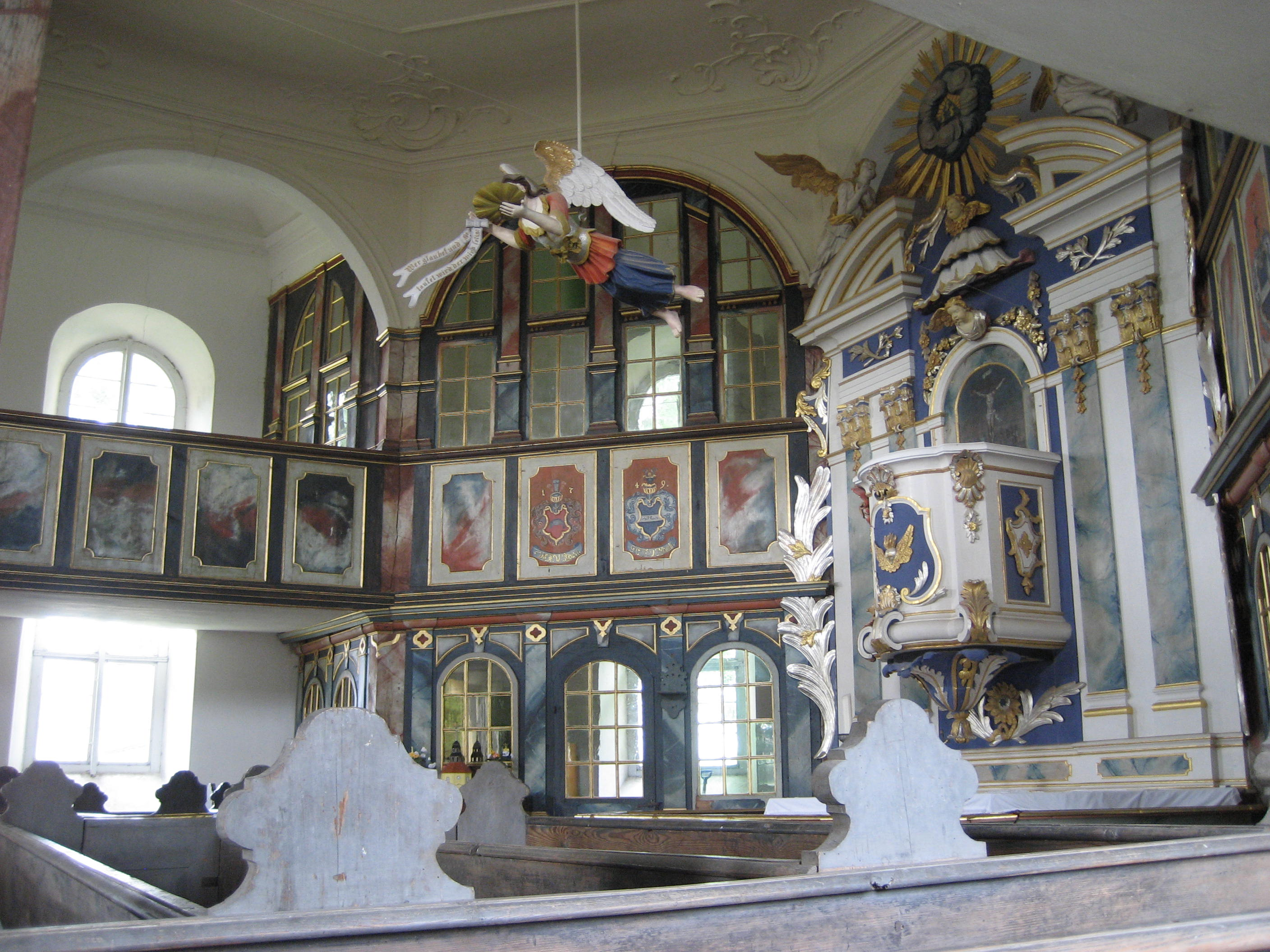 Innenansicht Kirche Weisdin